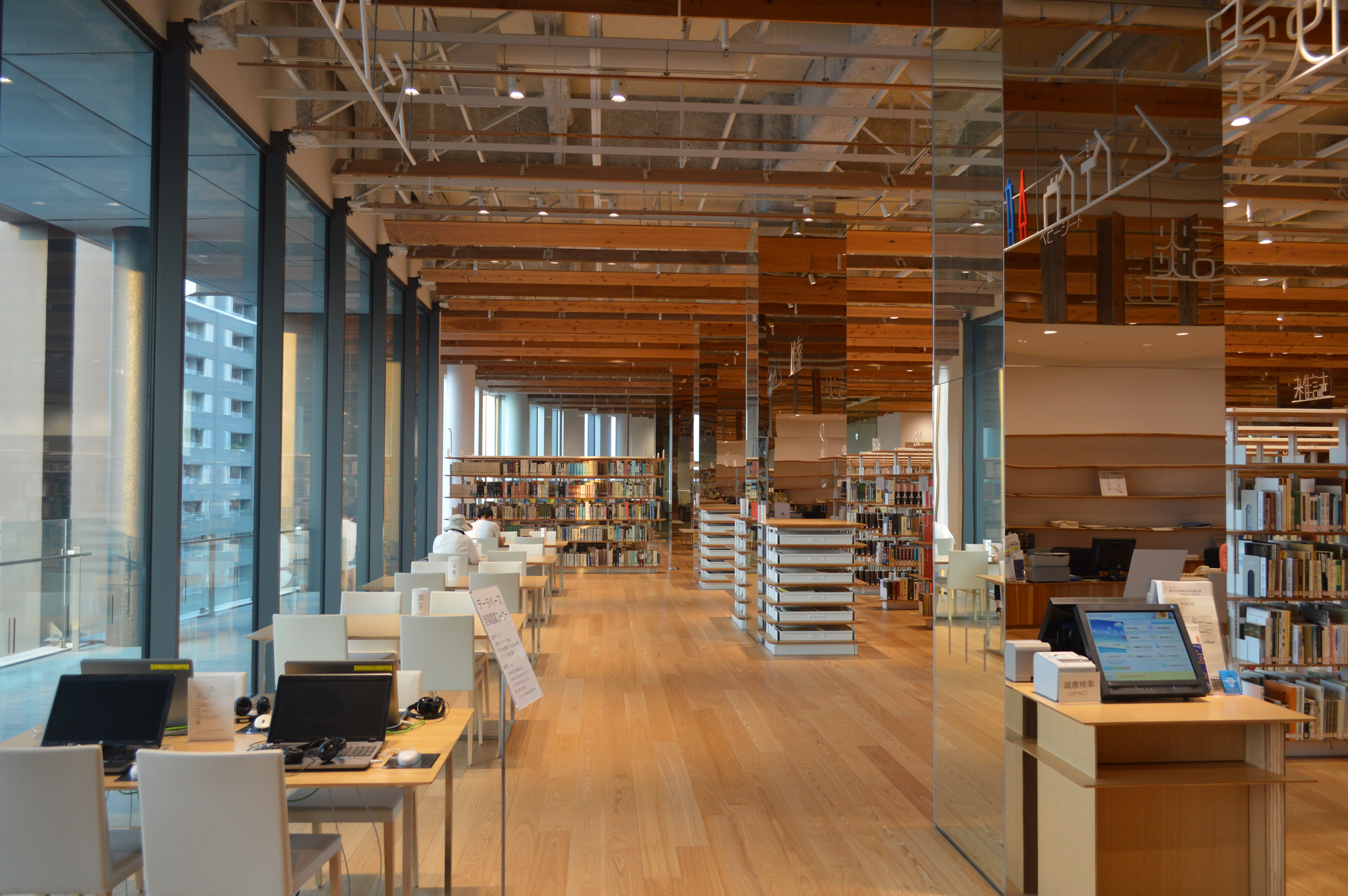 TOYAMAキラリ5階の富山市立図書館本館。